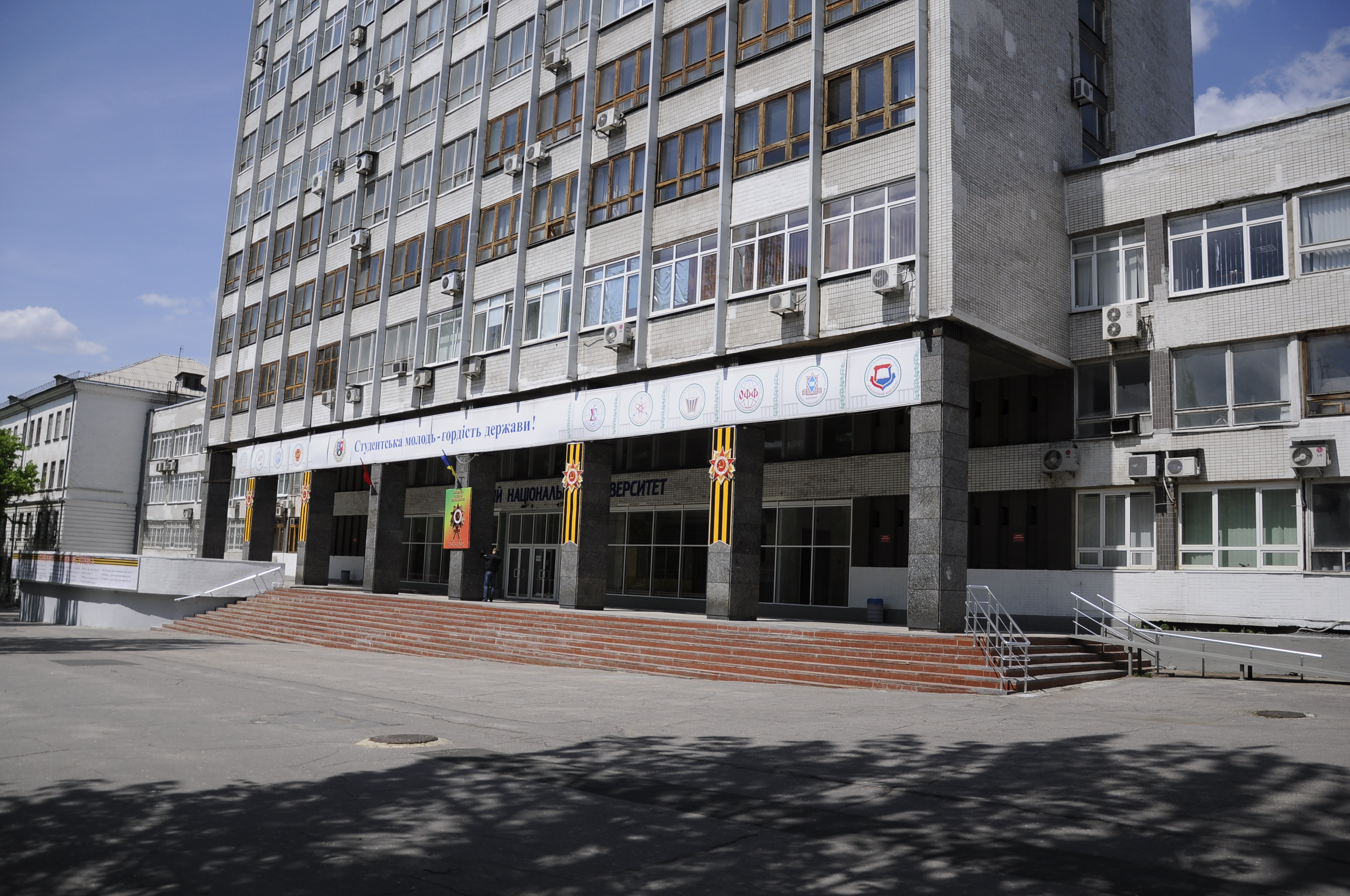 Донецк. День Победы.